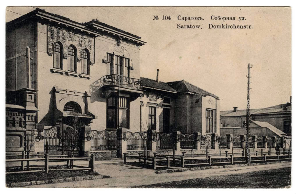 Особняк Рейнеке К. К. : ул. Соборная 22, Саратов. Архитектор Шехтель Ф. О.